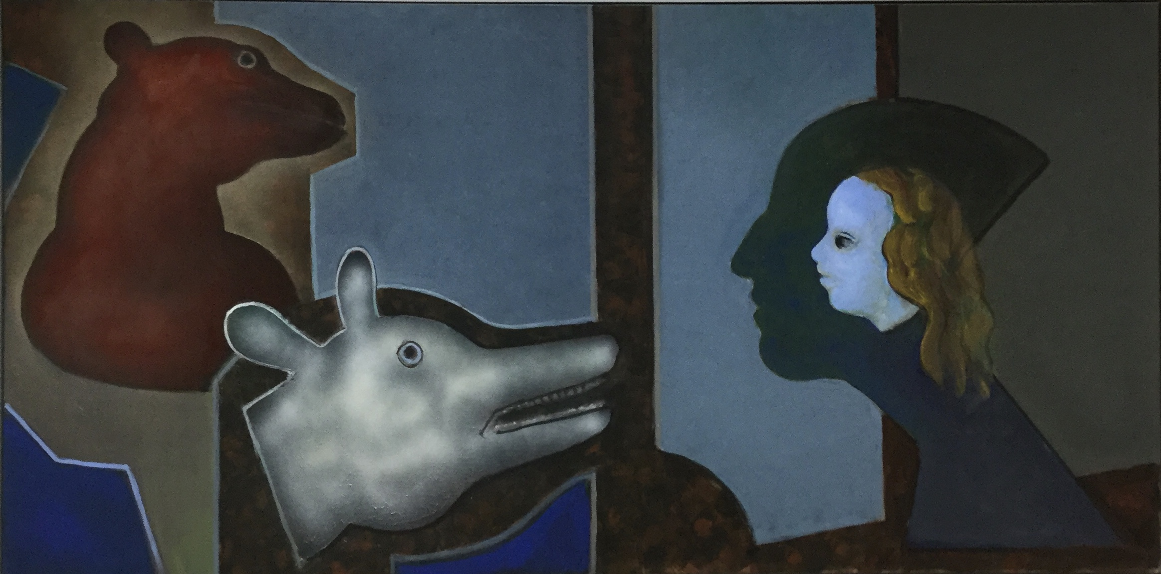 Maleri av den norske maleren Bjørn Krogstad: Barnet drømmer 2017–2019. . Akryl på lerret